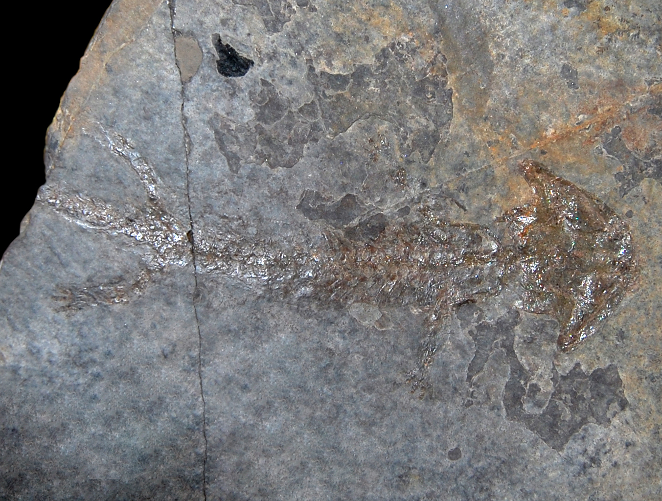 Naturhistorisches Museum Wien